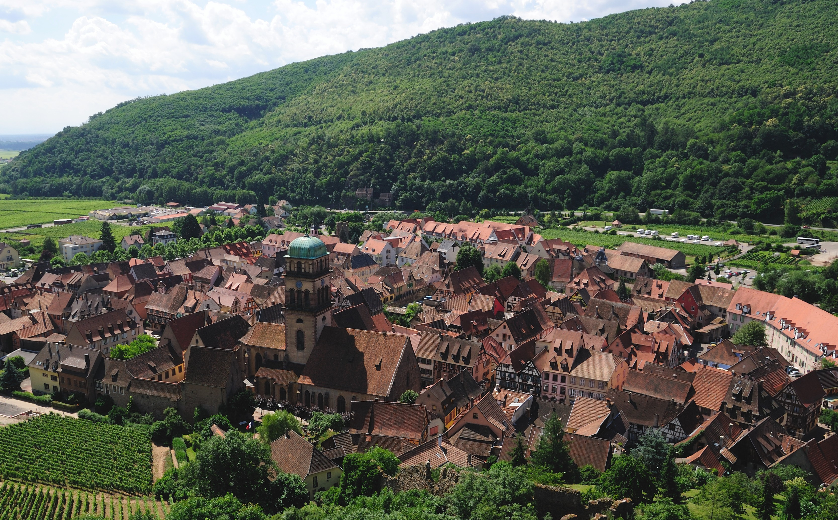 Kaysersberg, Elsaß